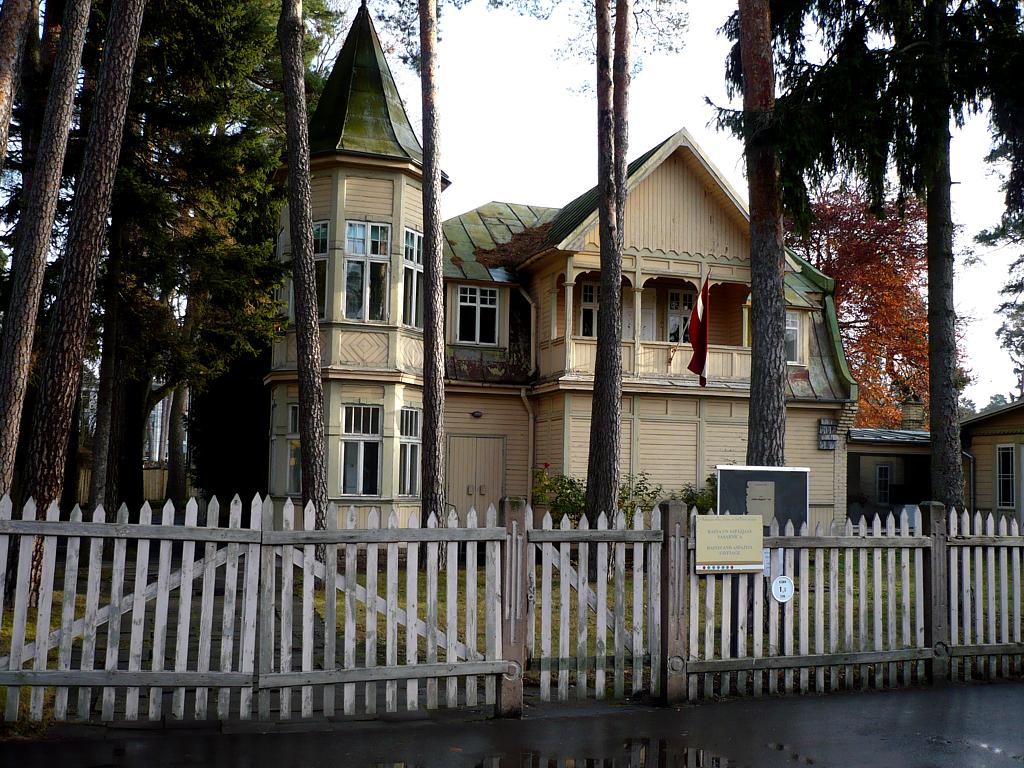 Jūrmala, Raiņa un Aspazijas vasarnīca 2009-11-18